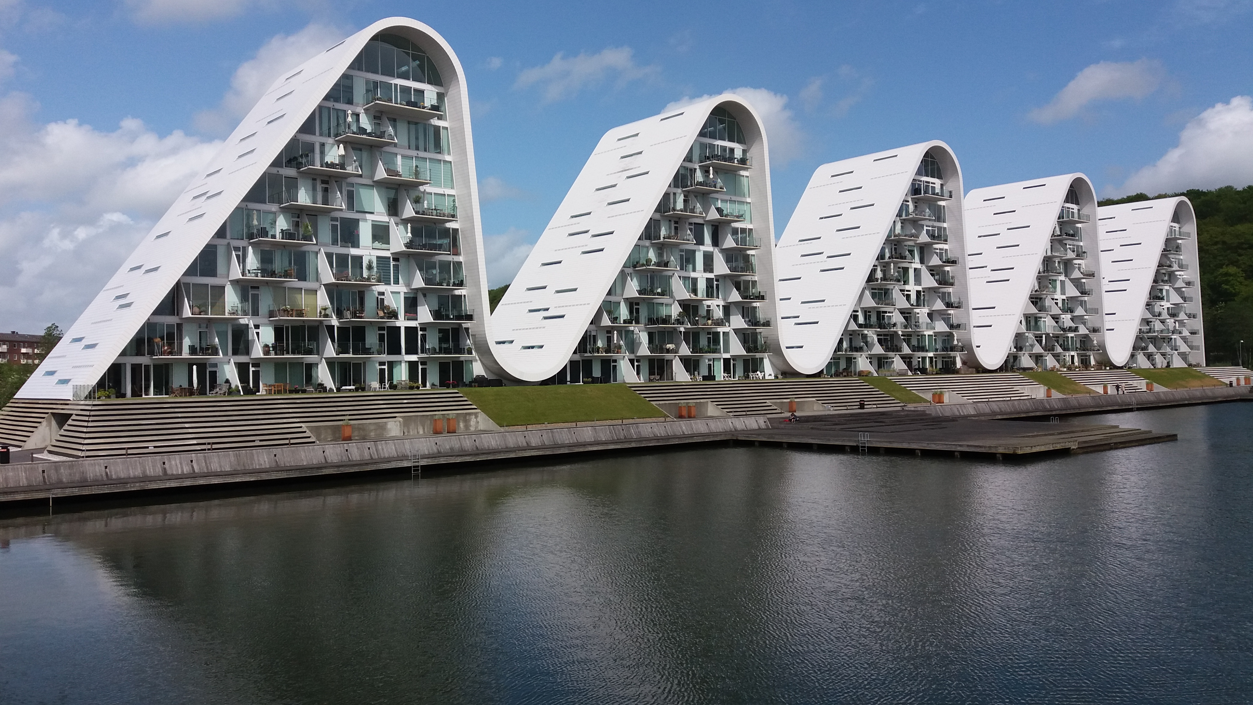 Bølgen Vejle